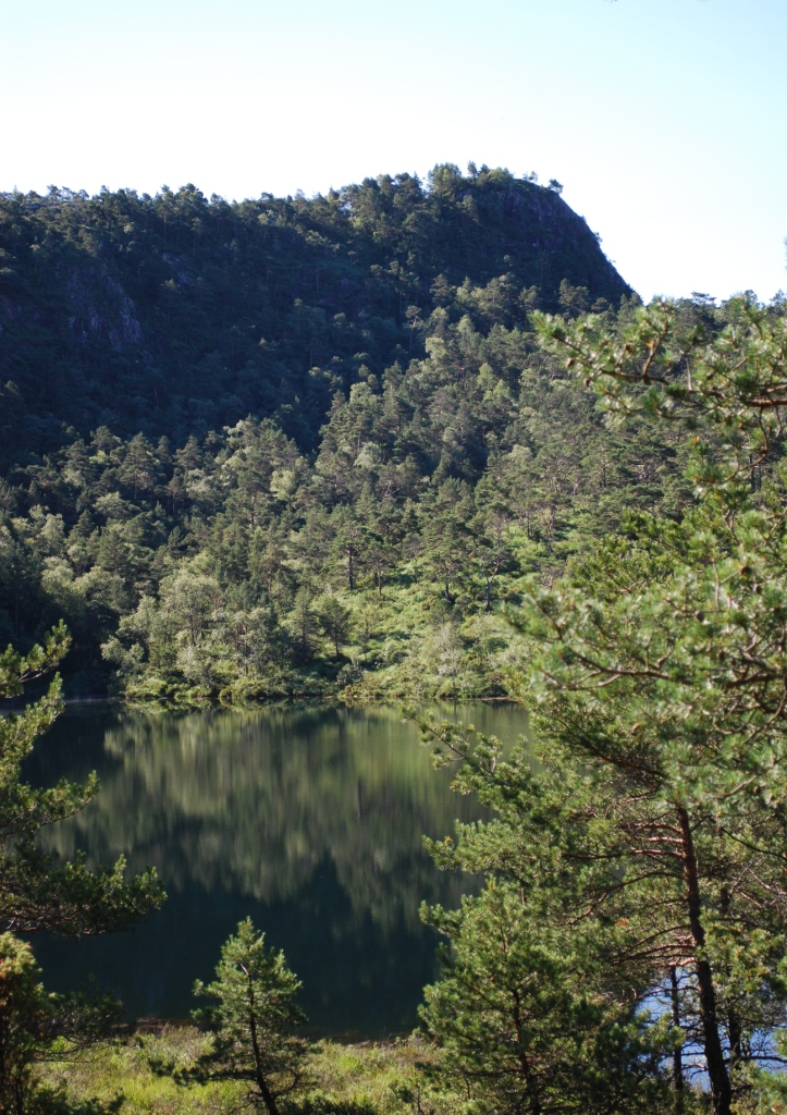 Description=Ytre Arna